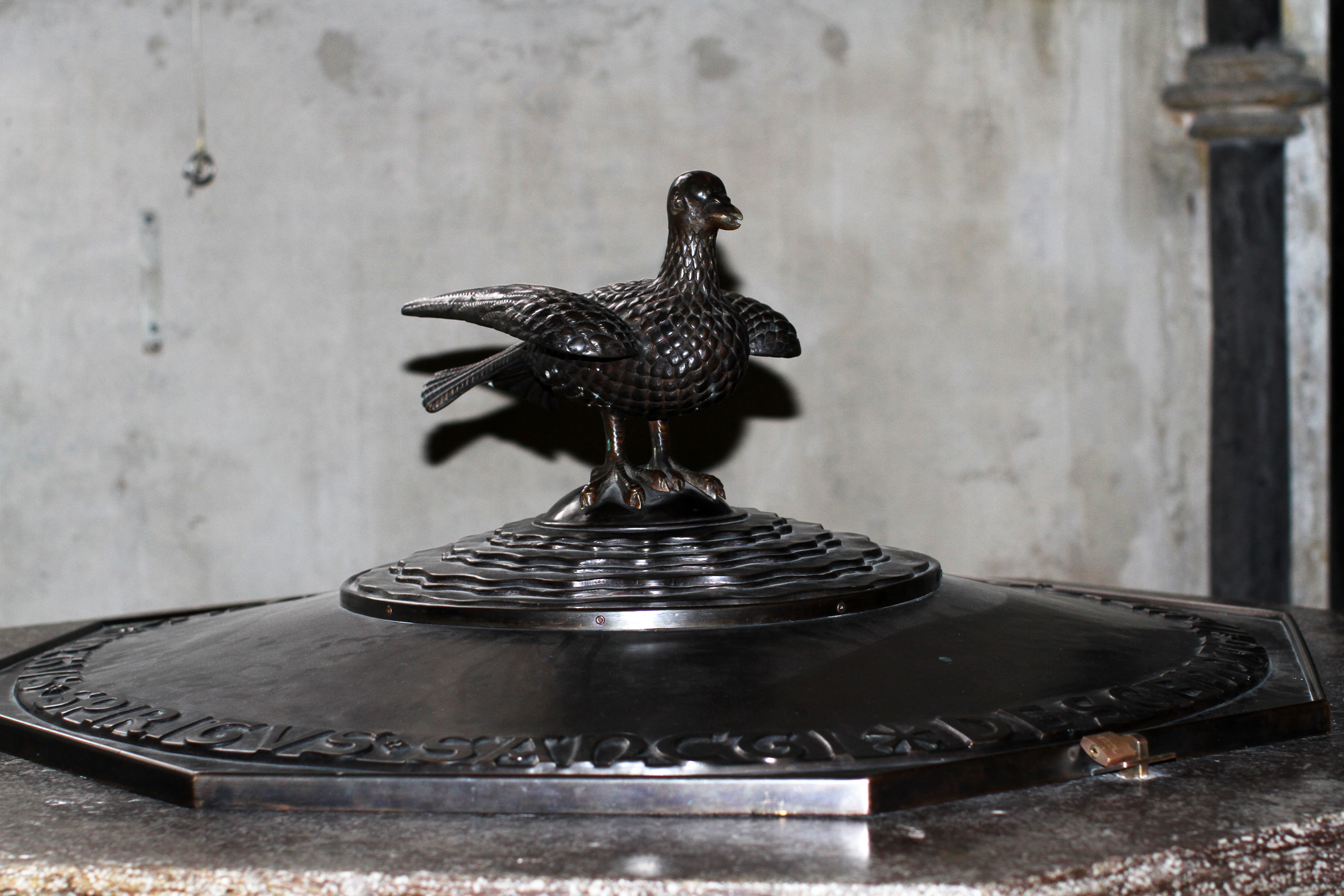 St. Gereon Köln, Interior